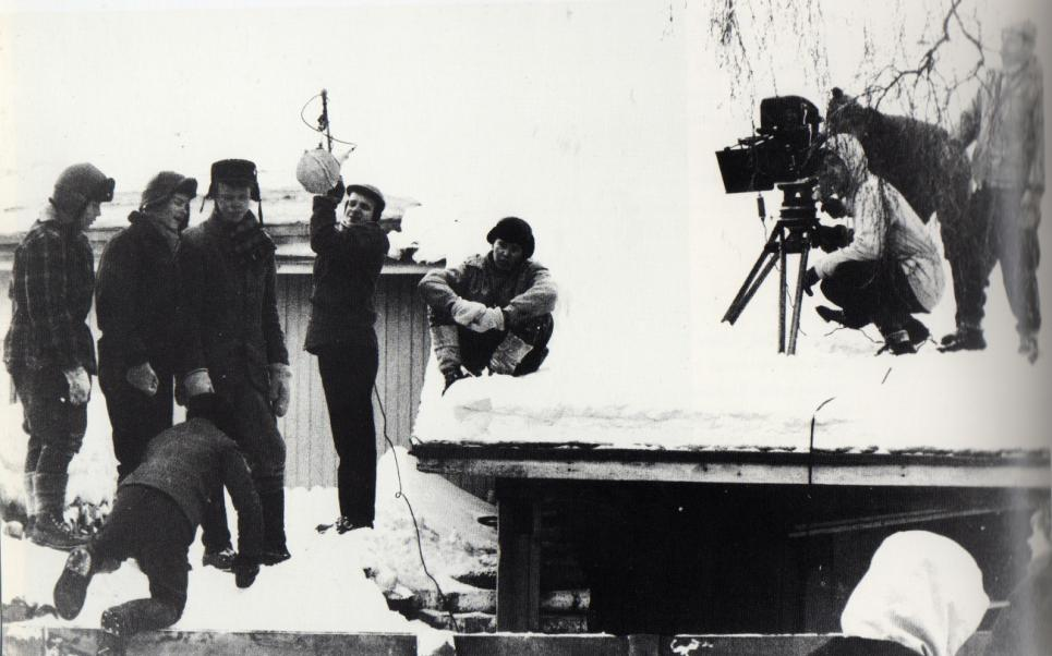 Helmikuussa 1962 filmattiin Oulussa Paavo Rintalan romaaniin Pojat pohjautuvaa elokuvaa. Mikrofonin vasemmalla puolella Vesa-Matti Loiri.